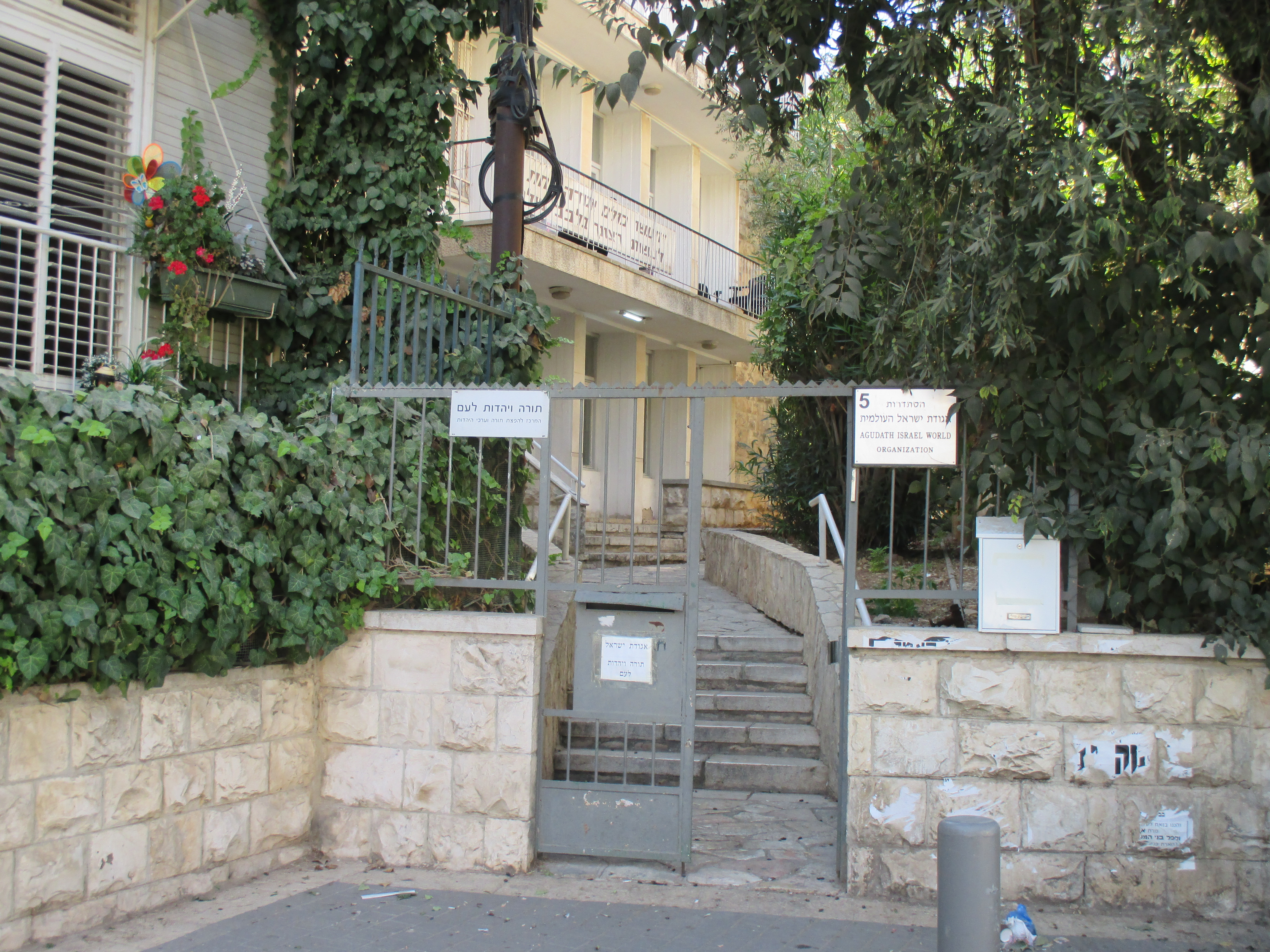 בניין ההסתדרות הכללית של אגודת ישראל ברחוב שומרי הכותל (אורנשטיין) בירושלים